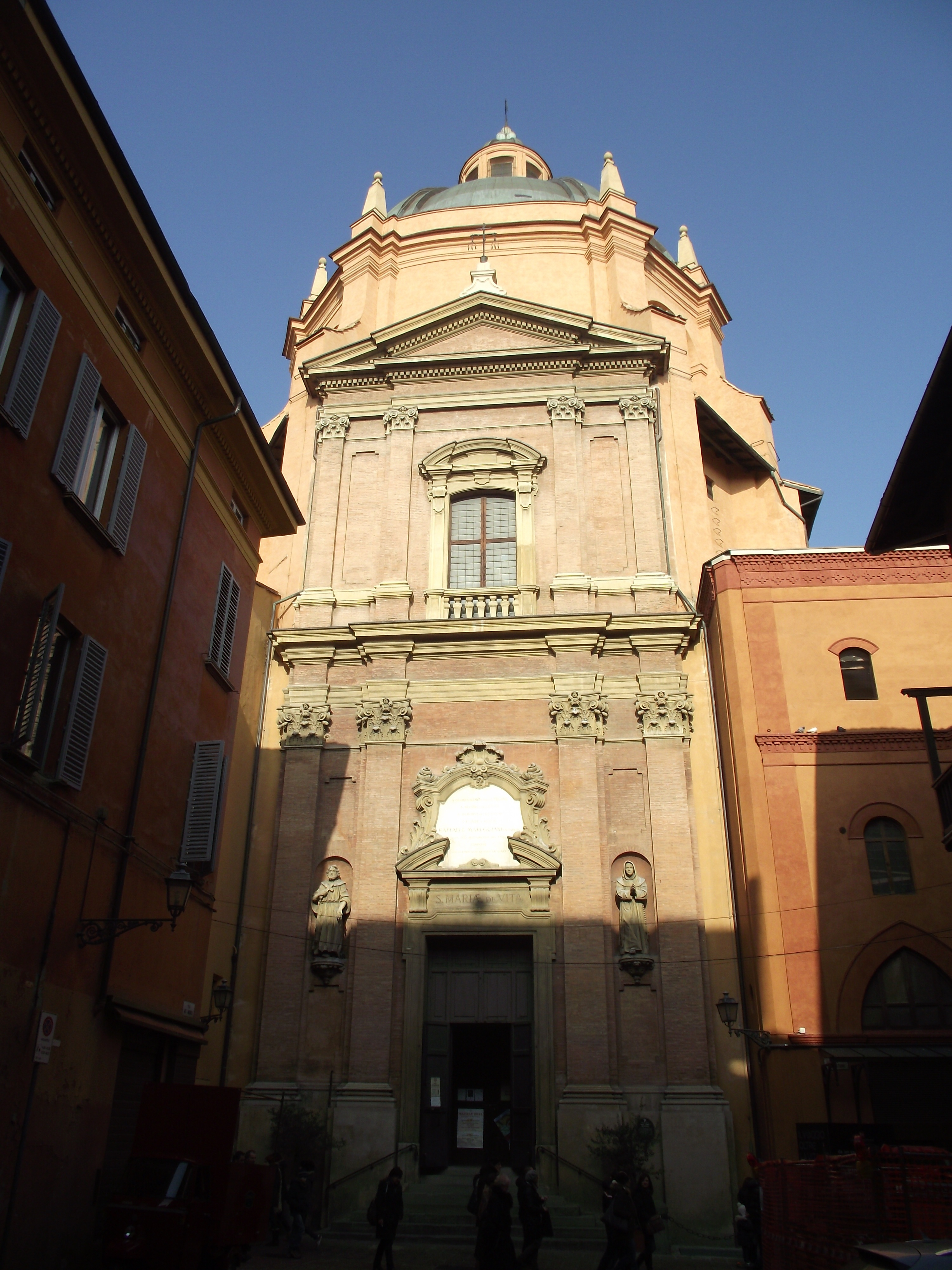 Bologna, Via Clavature, Chiesa di Santa Maria della Vita, G.B.Bergonzoni, 1687-90